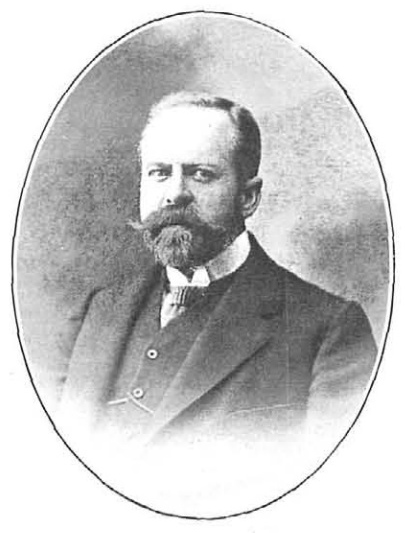 Emilio Ortuño